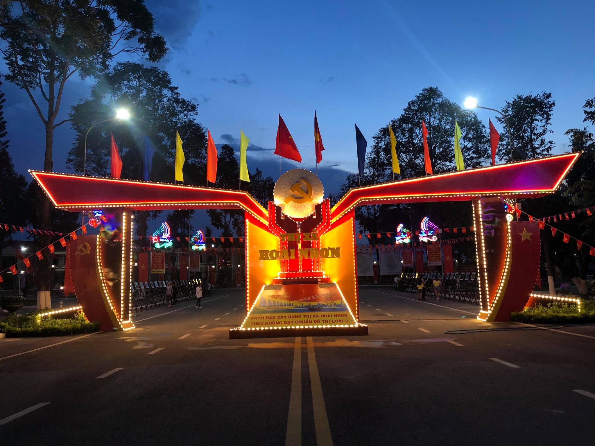 Đại lộ hướng về thành ủy Hoài Nhơn